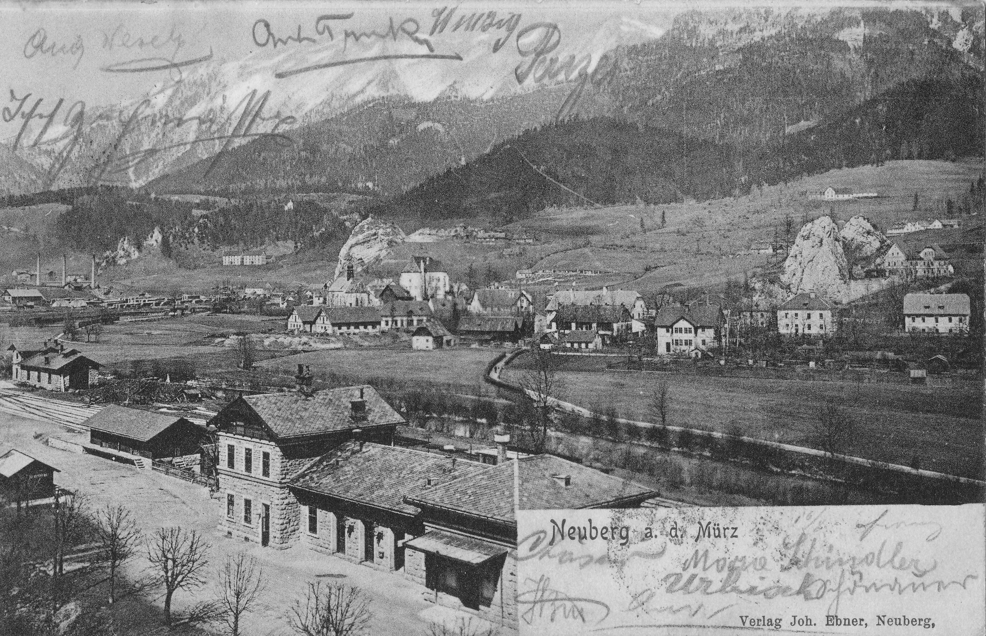 Neuberg an der Mürz mit Bahnhof, historische Postkarte